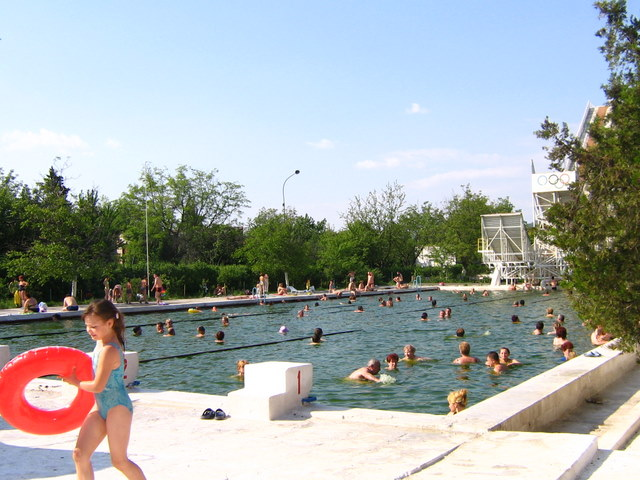 берегово